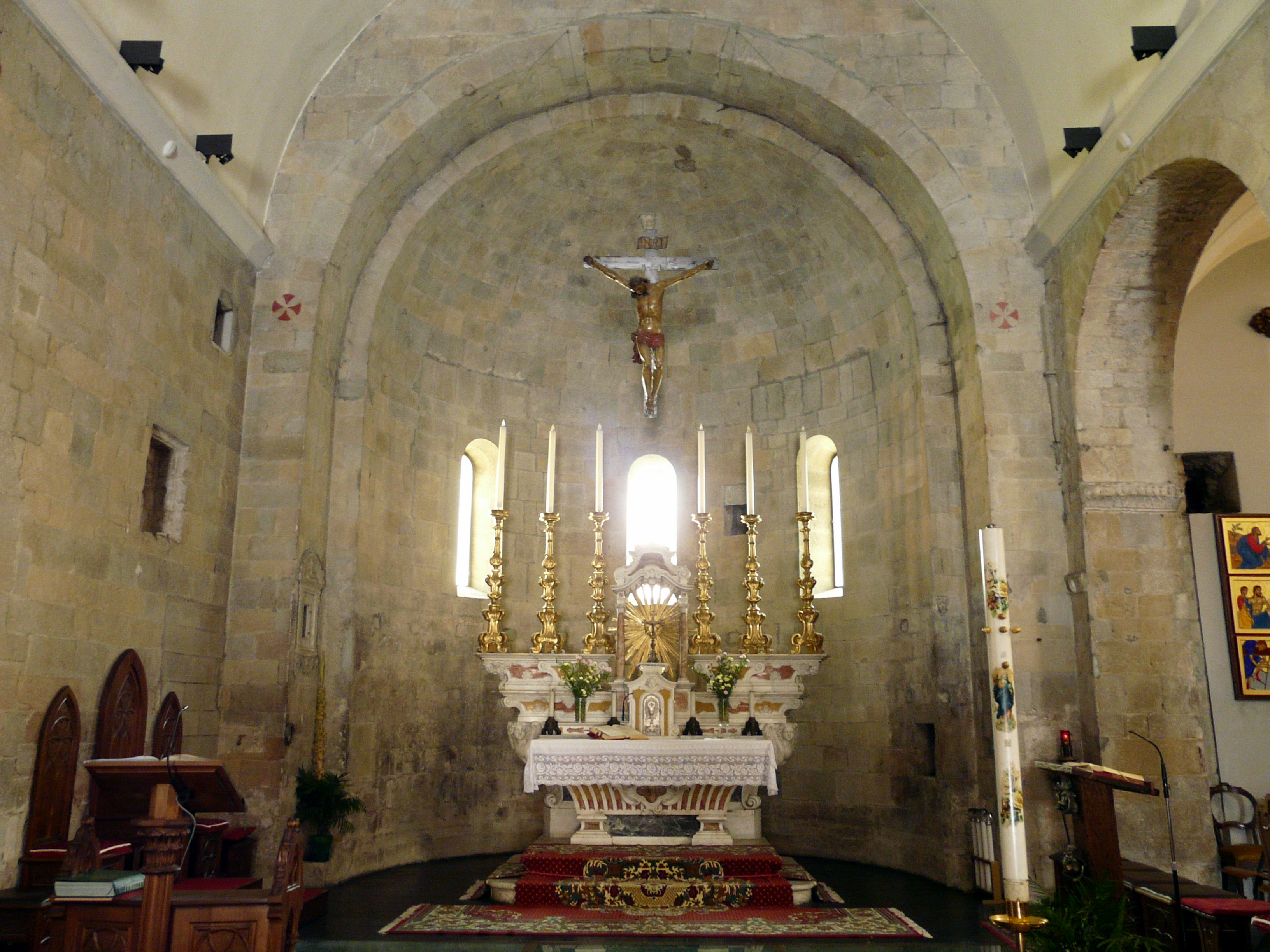 Altare maggiore della cattedrale di Brugnato, Liguria, Italia